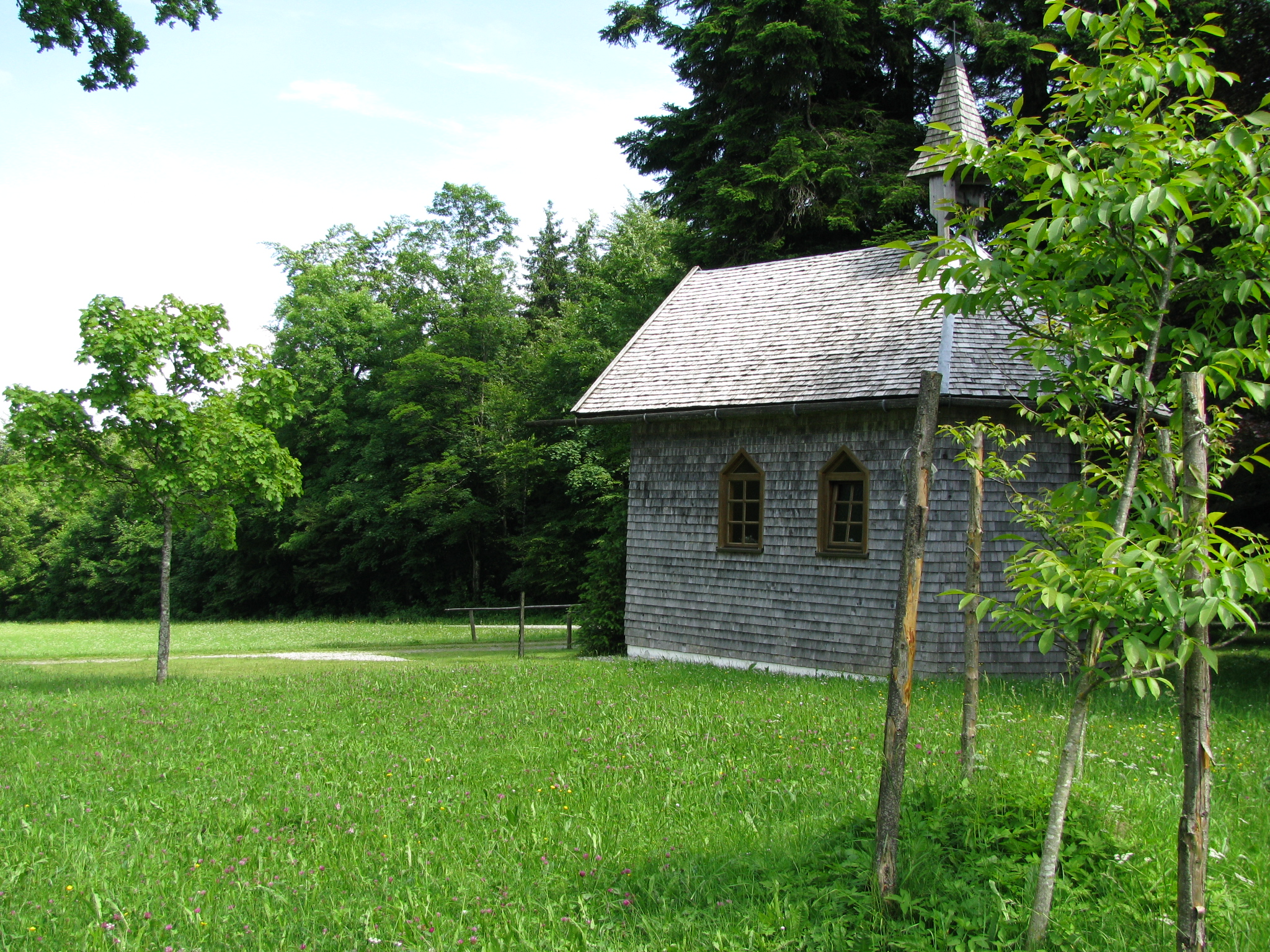 Waldkapelle im Kempter Wald, Landkreis Oberallgäu